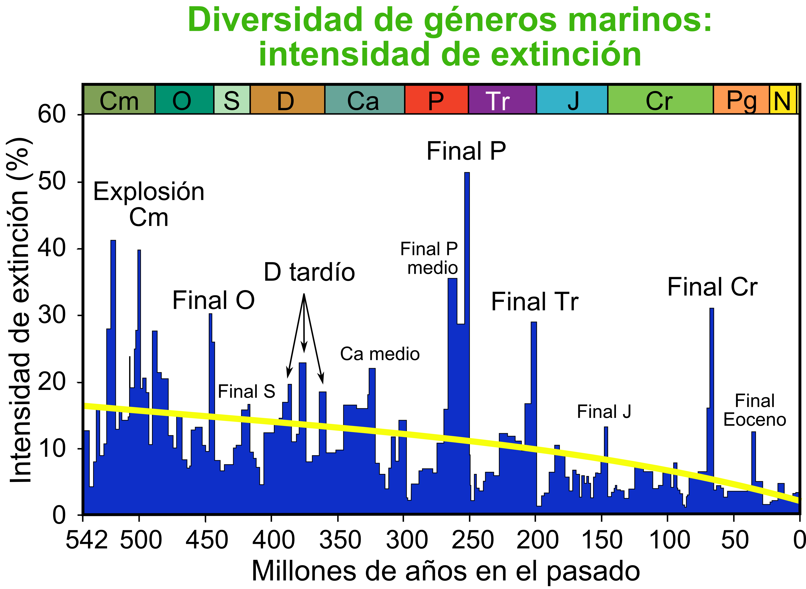 Versión en español de Extinction_Intensity.png (licencia GDFL), elaborado por Dragons flight, según Rohde & Muller (2005).